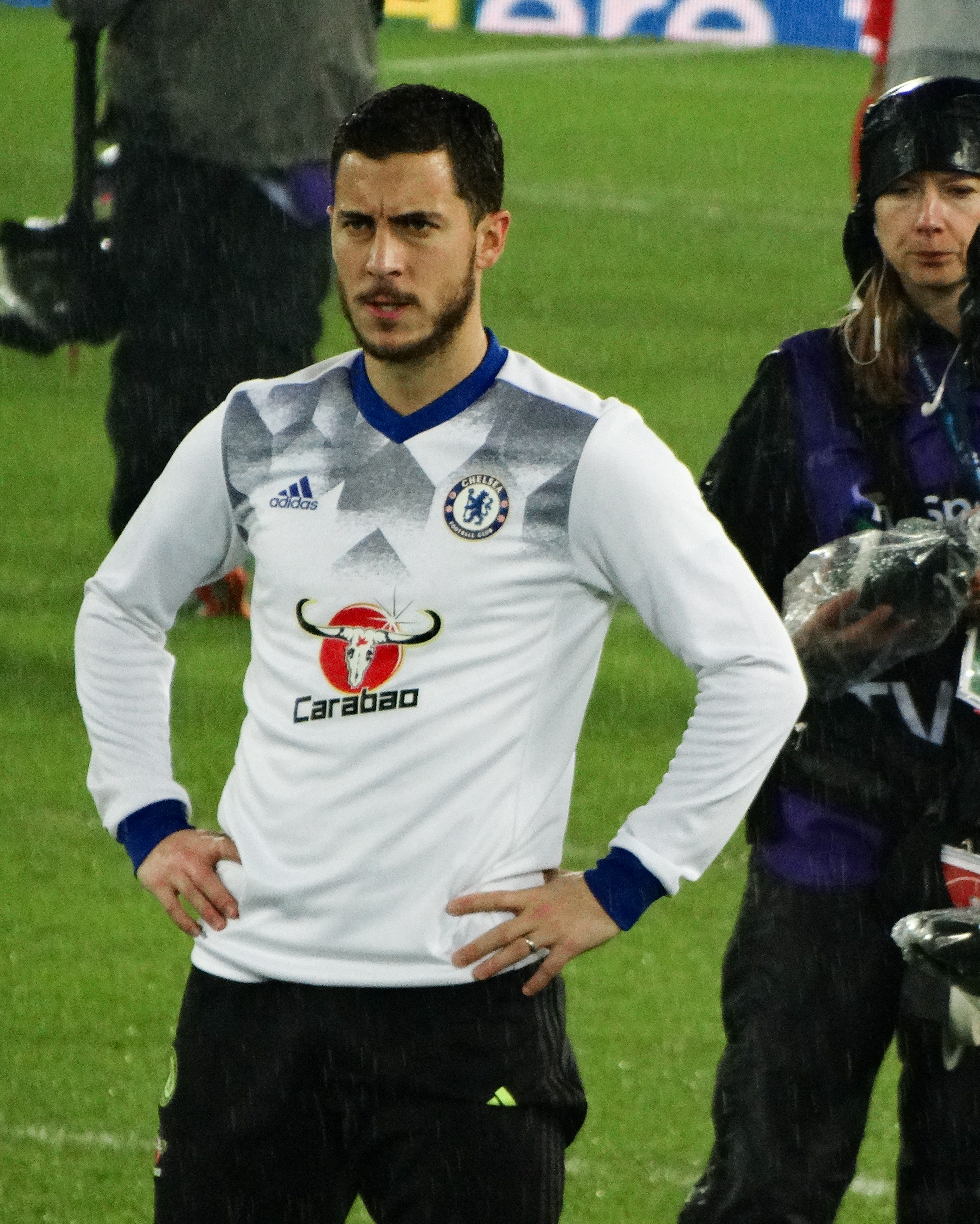 Liverpool 1:1 Chelsea